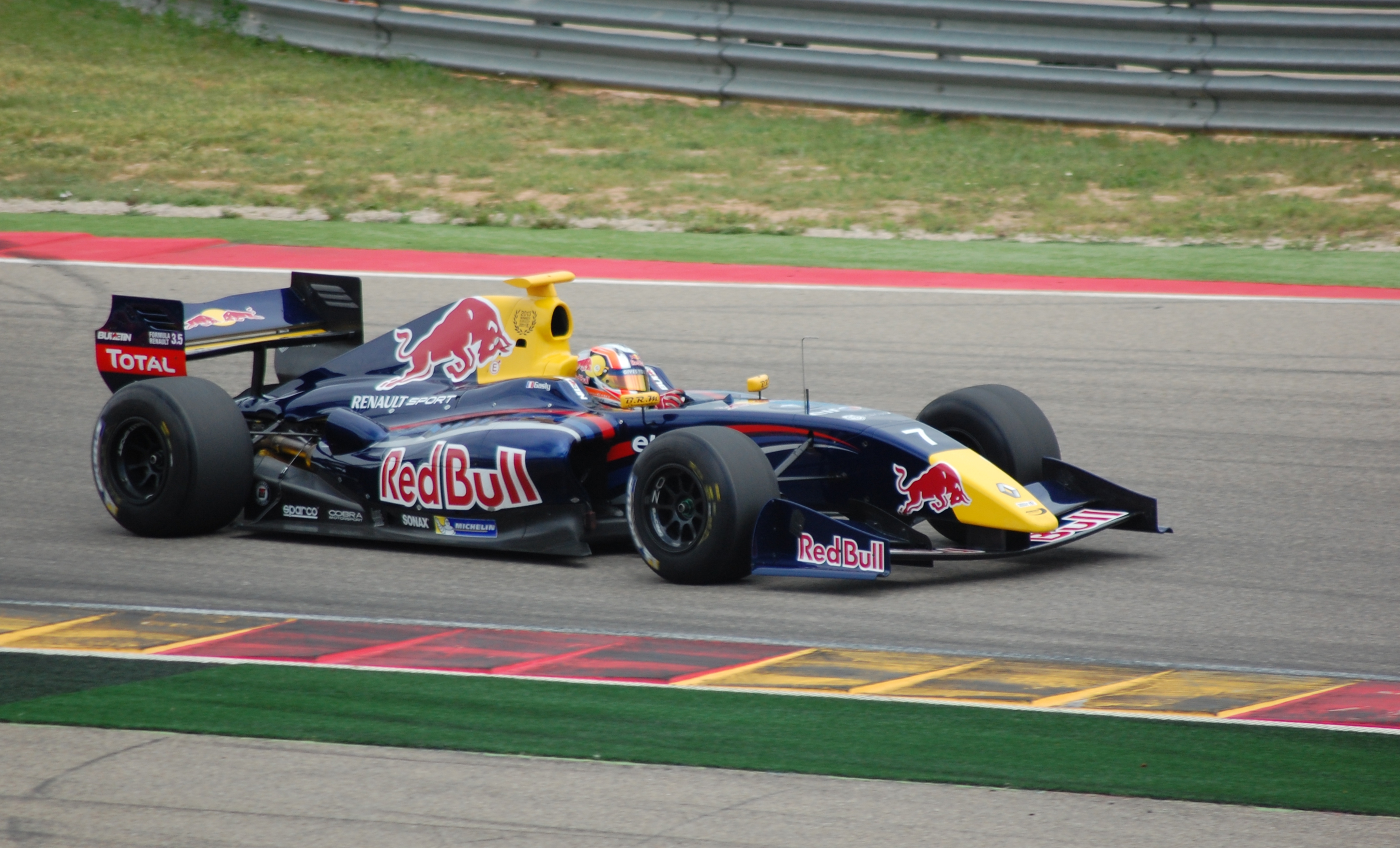 Aragonés: Pierre Gasly en Motorland